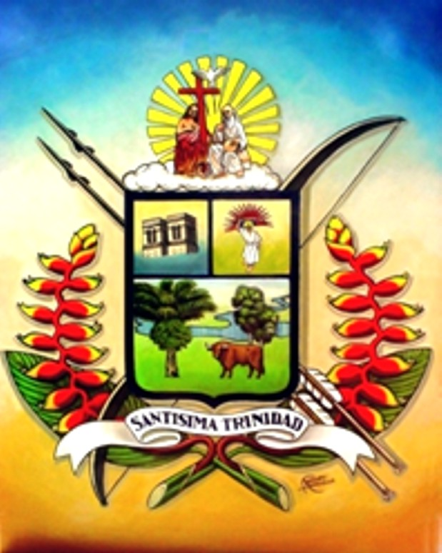 Escudo anterior del Beni